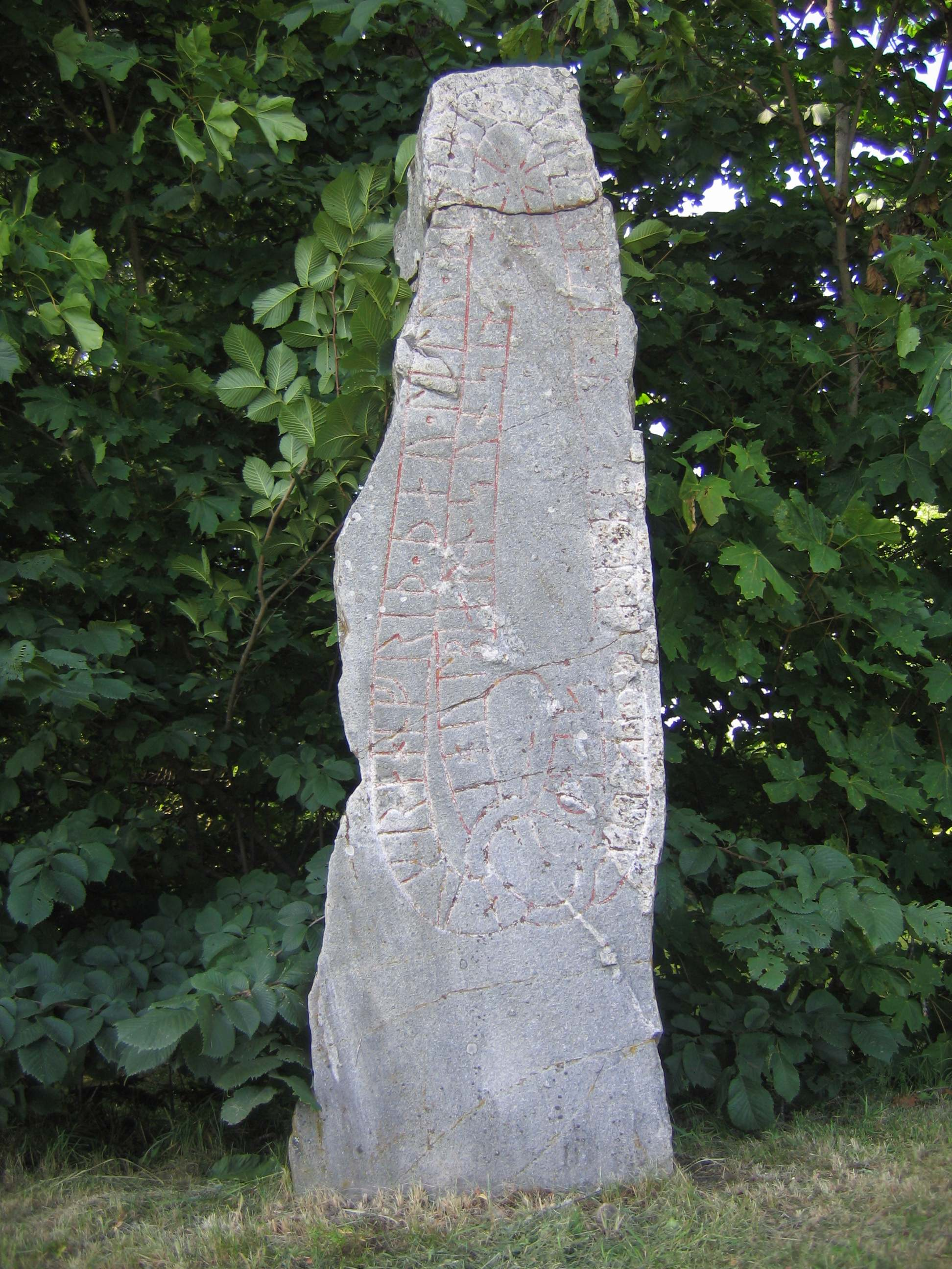 Runstenen Sö 141 vid Aspa Bro i Ludgo socken, Södermanland.